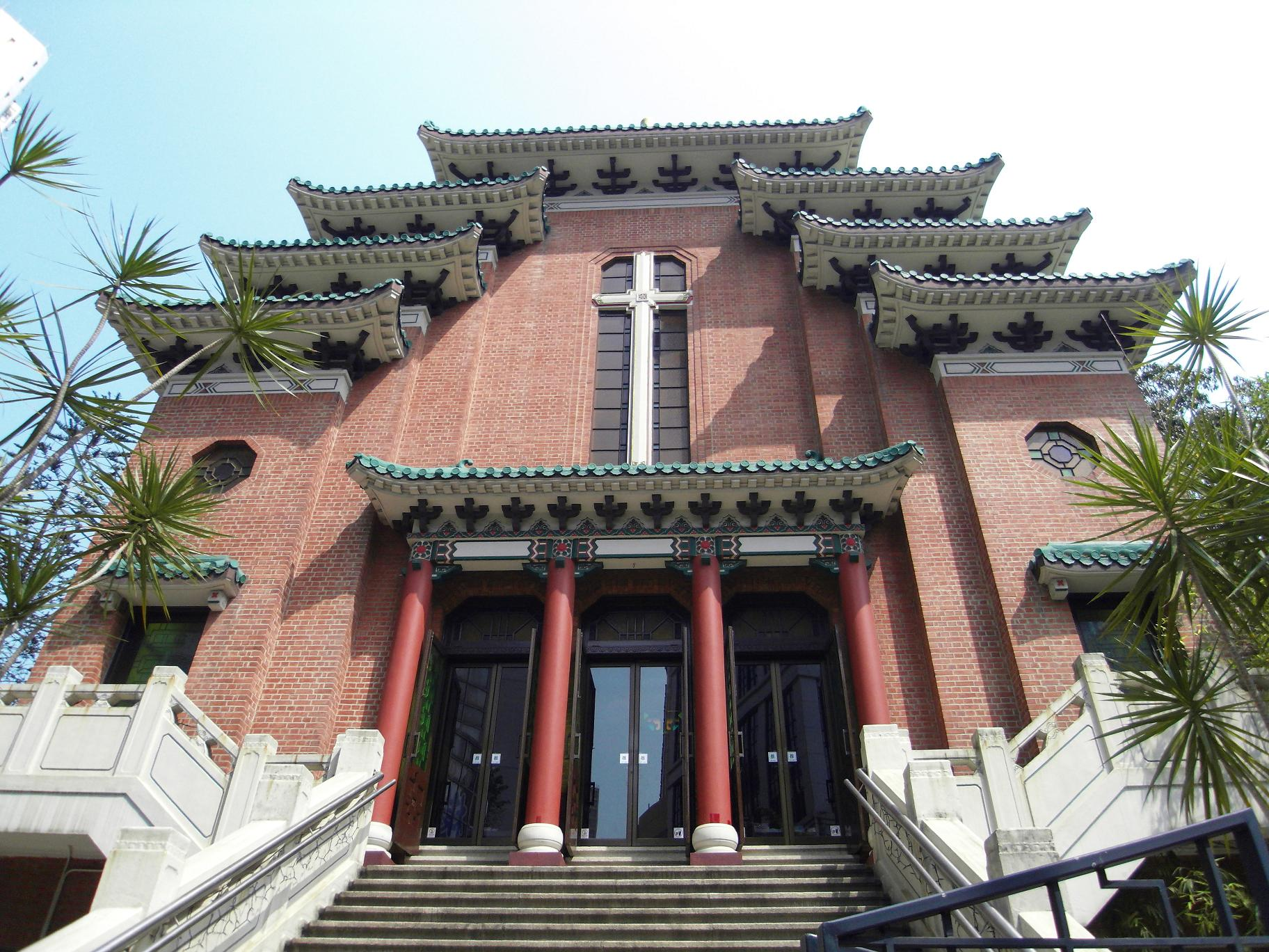 中文（香港）: 聖公會聖瑪利亞堂,銅鑼灣道,香港